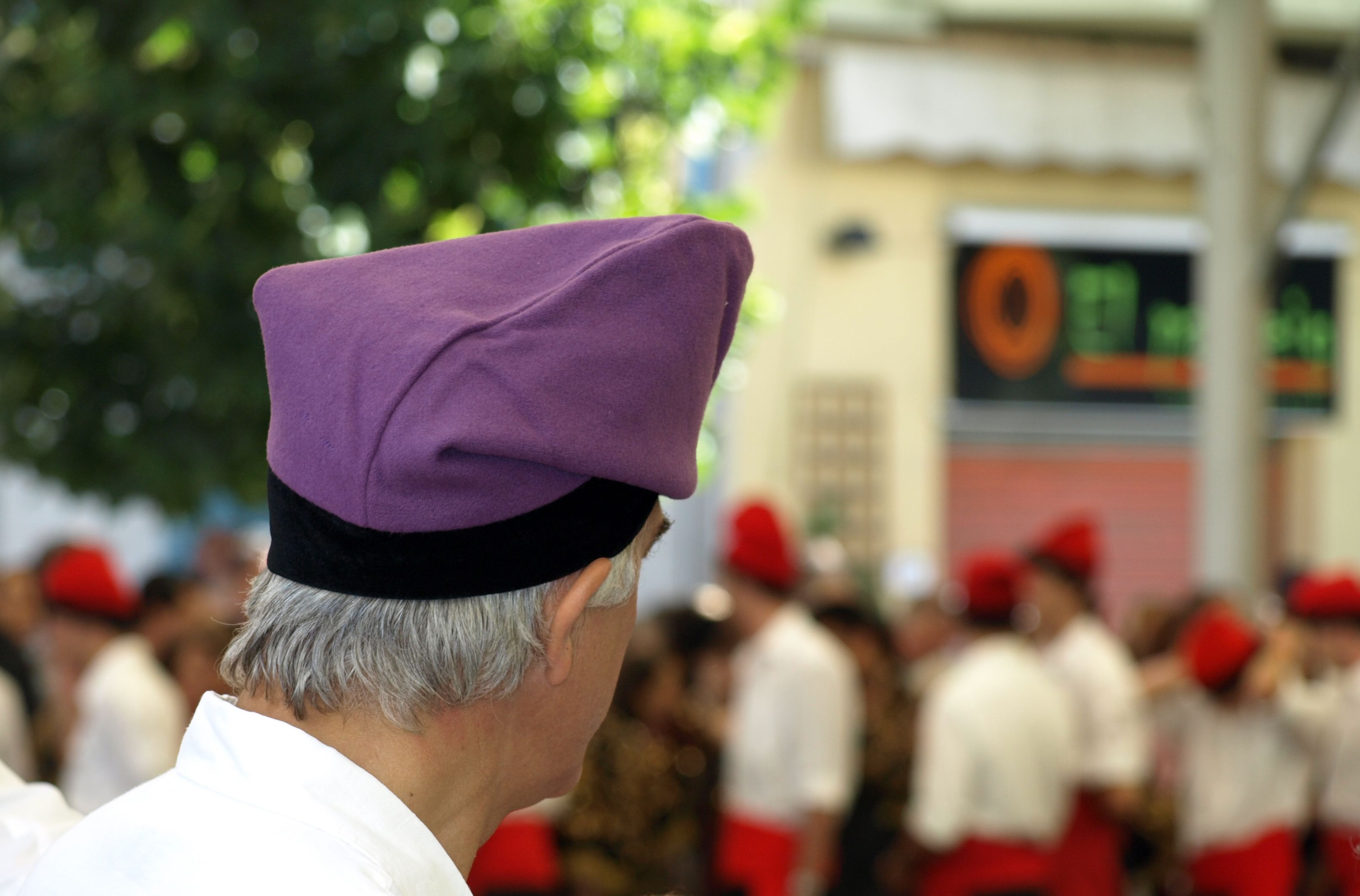 A la festa major de La Seu d'Urgell, preparats per ballar el ball Cerdà.